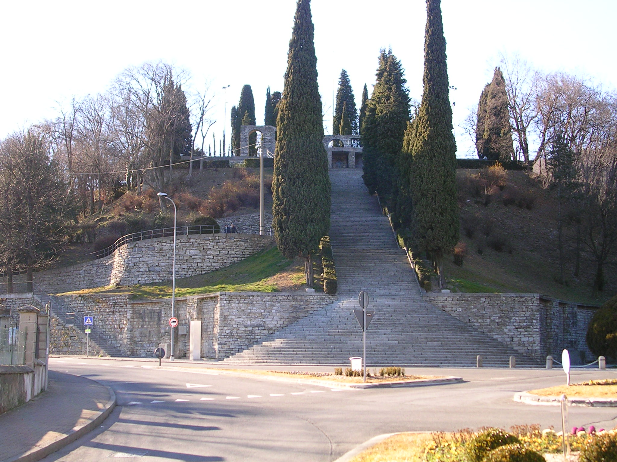 Monumento ai caduti della I Guerra Mondiale di Giuseppe Terragni, situato a Erba (CO). Fotografia libera dai diritti di copyright, ceduta a Wikipedia dall'autore stesso, Stefano Ripamonti.